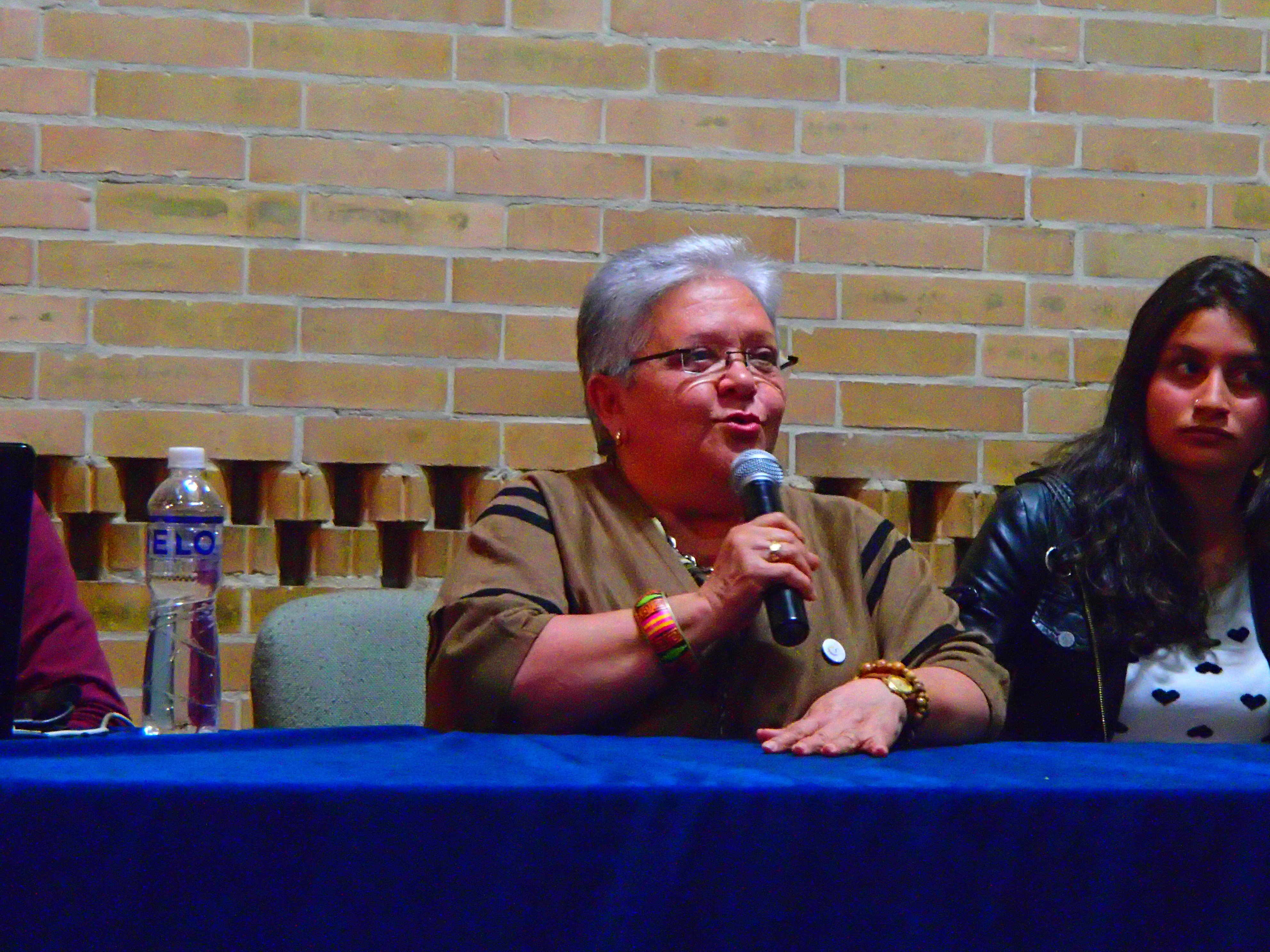 Imelda Daza en conferencia en Universidad Nacional de Colombia, 27 de febrero de 2017